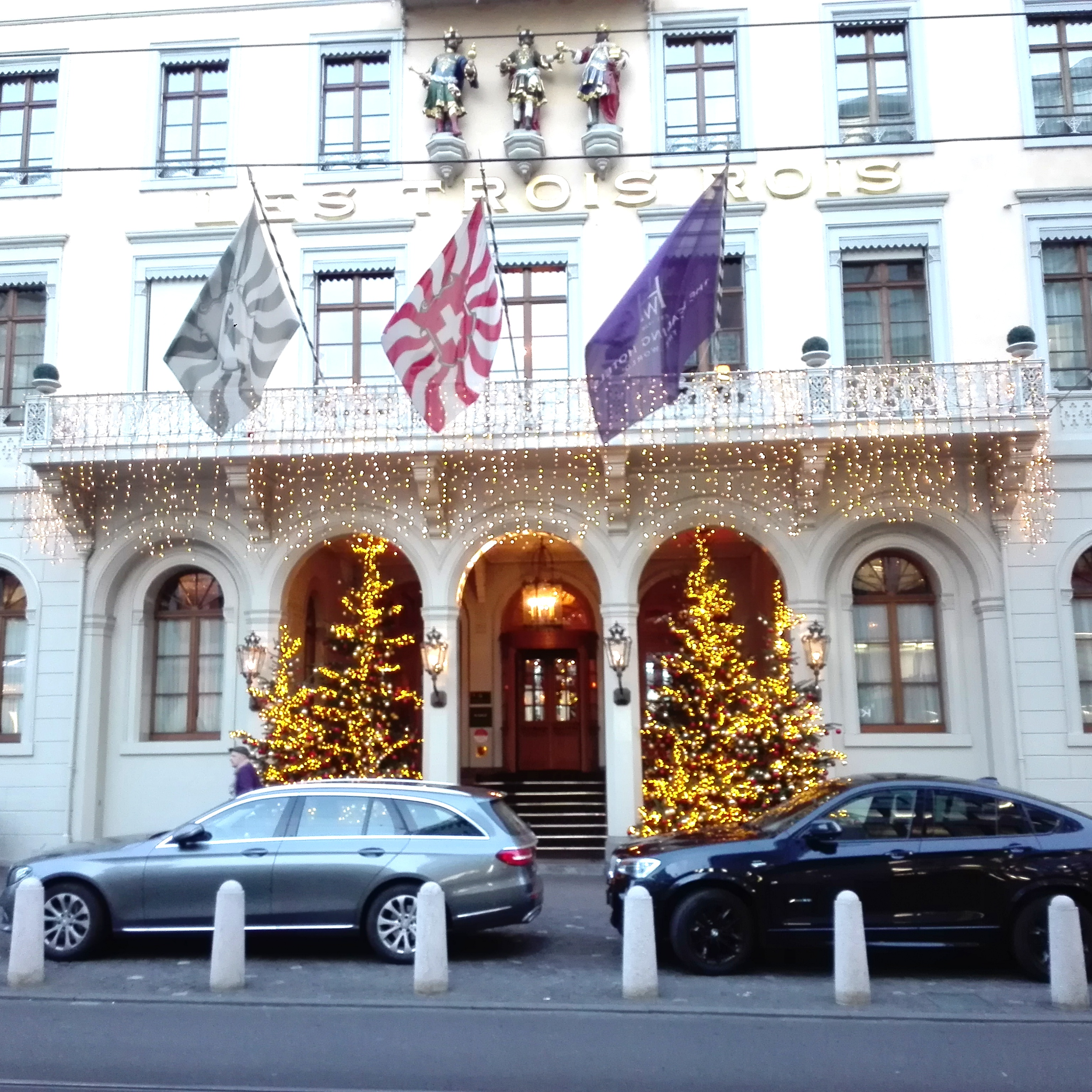 Grand Hôtel Les Trois Rois, Bâle